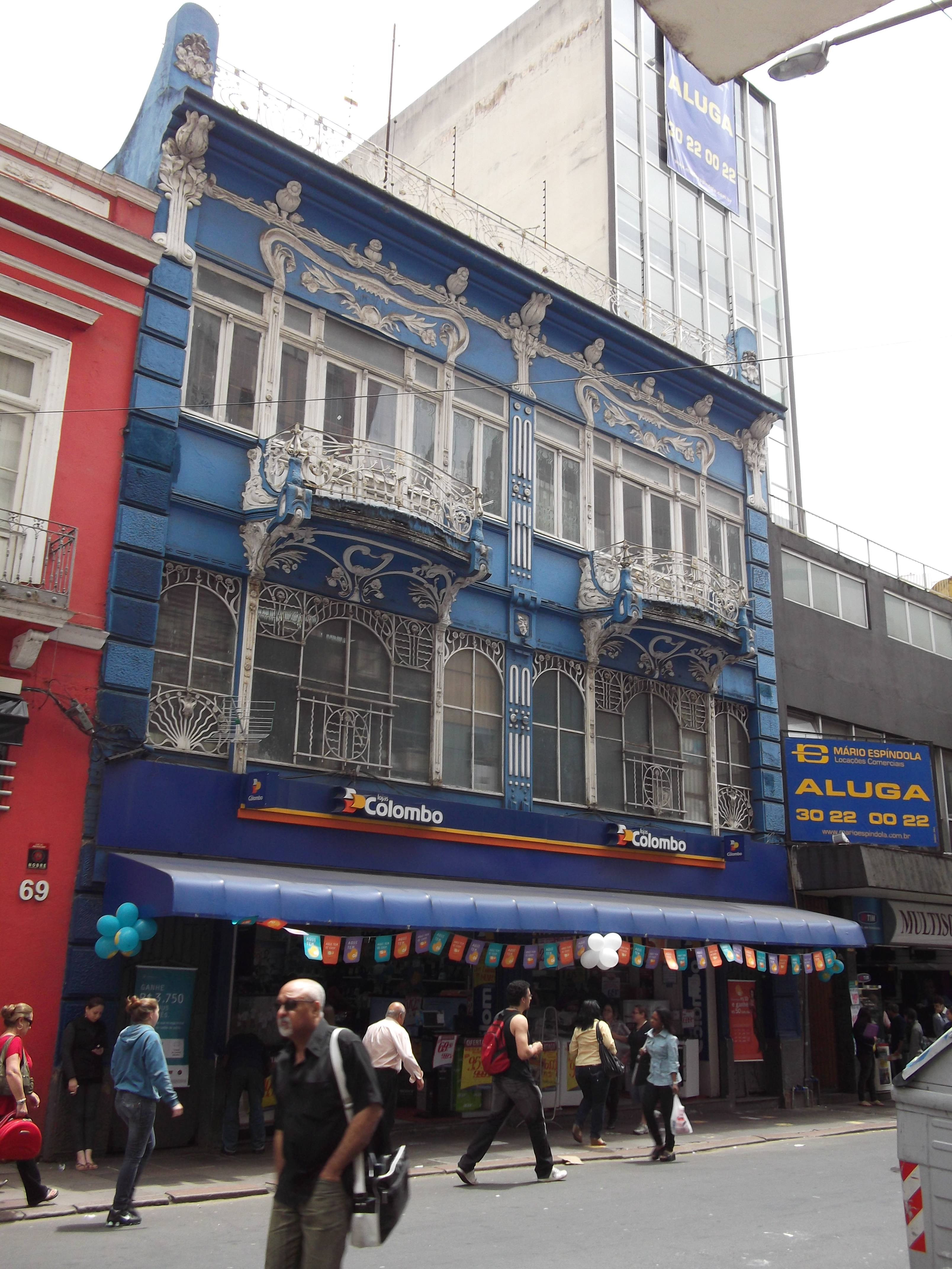 Rua Doutor Flores n. 119, Centro Histórico, Porto Alegre, Brasil - Lojas Colombo